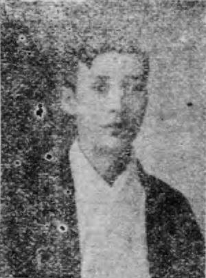 Masajiro Ishia